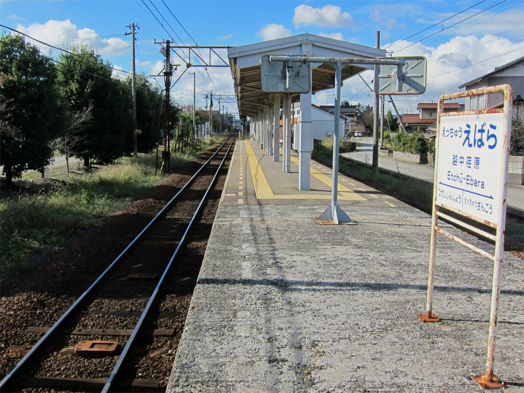 富山地方鉄道本線越中荏原駅 ホーム